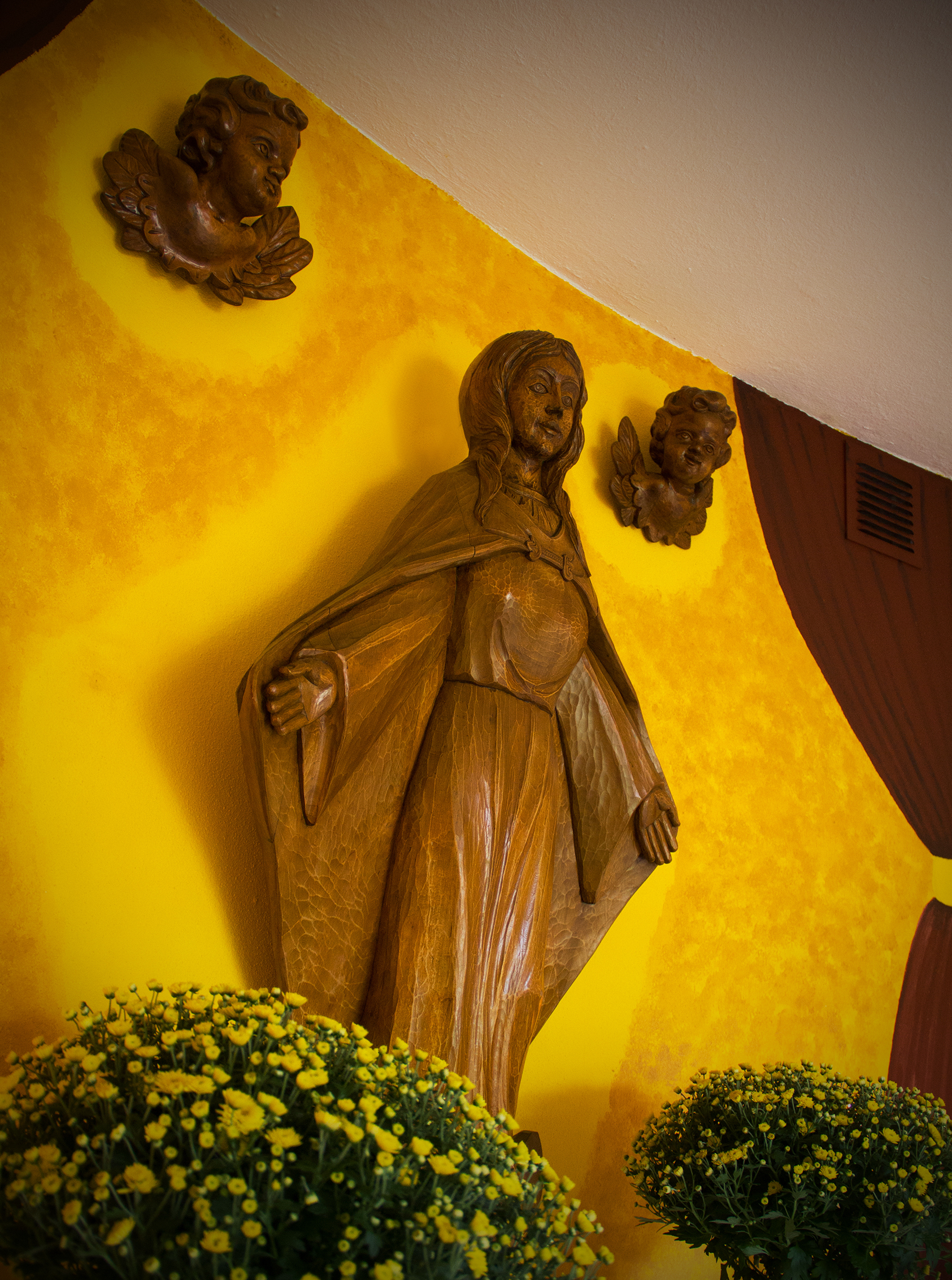 Schutzmantelmadonna im Innern der Sebastian-Kapelle zu Kupferberg (August 2017)